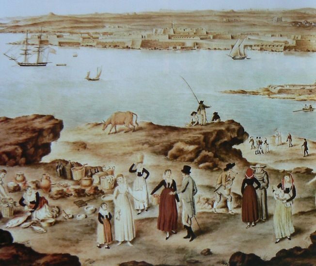 veu el port de Maó l'any 1770, vist des del cap de La Mola.detail